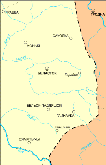 Карта Усходняй Беласточчыны на беларускай мове